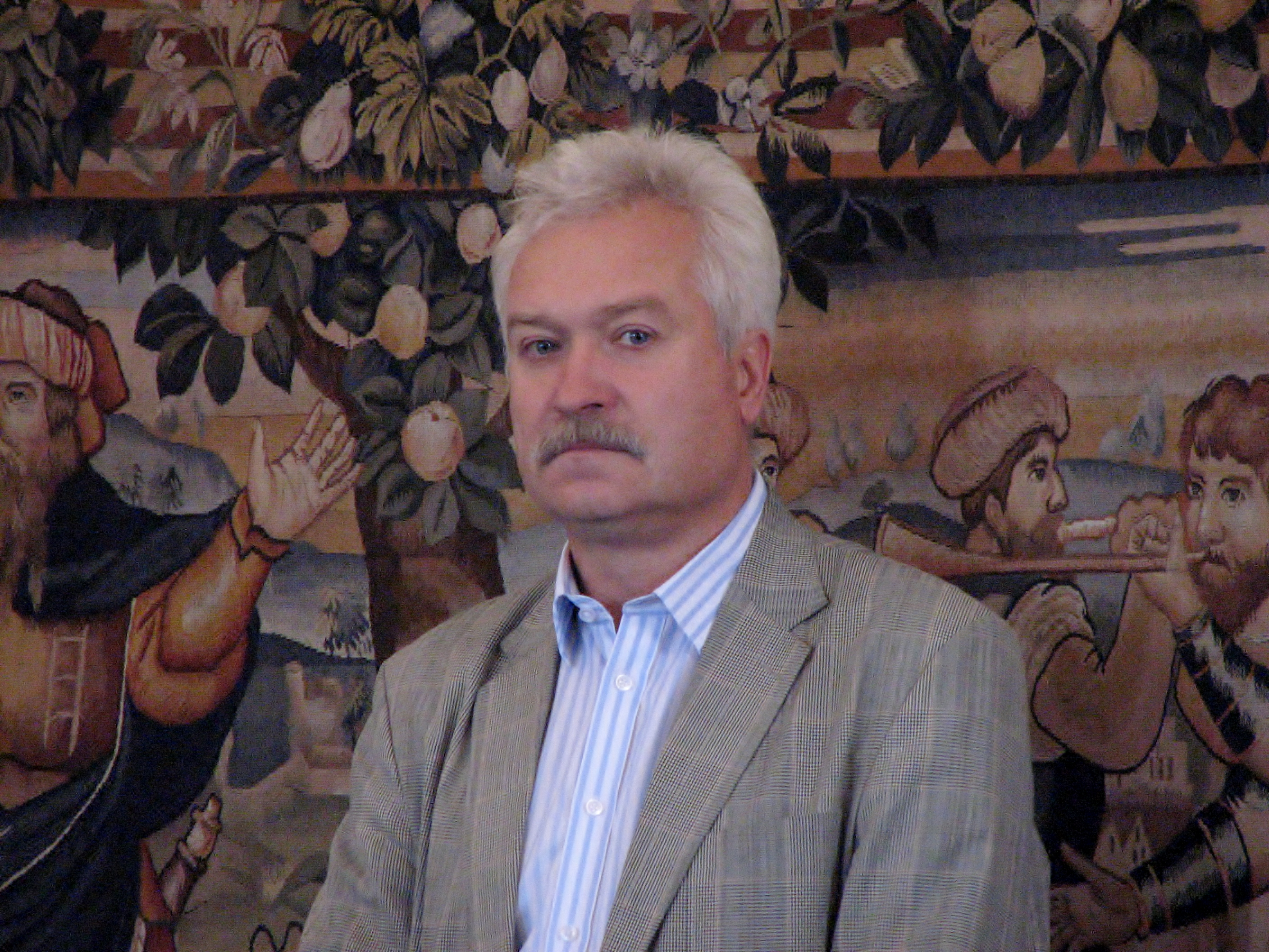 Mihhail Vladislavlev teatrifestivali "Kuldne mask Eestis 2012" vastuvõtul Tallinna raekojas